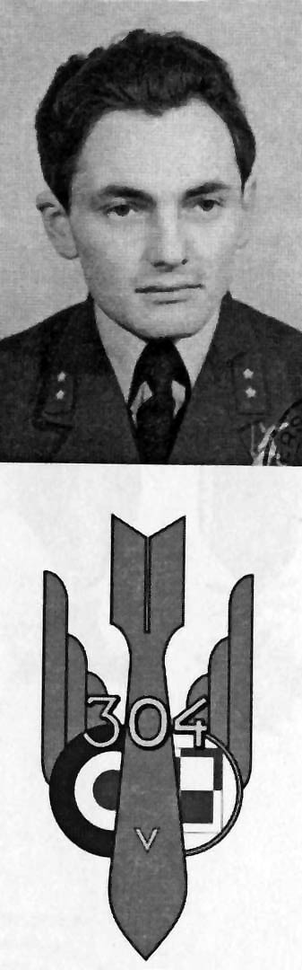 Henryk Franczak